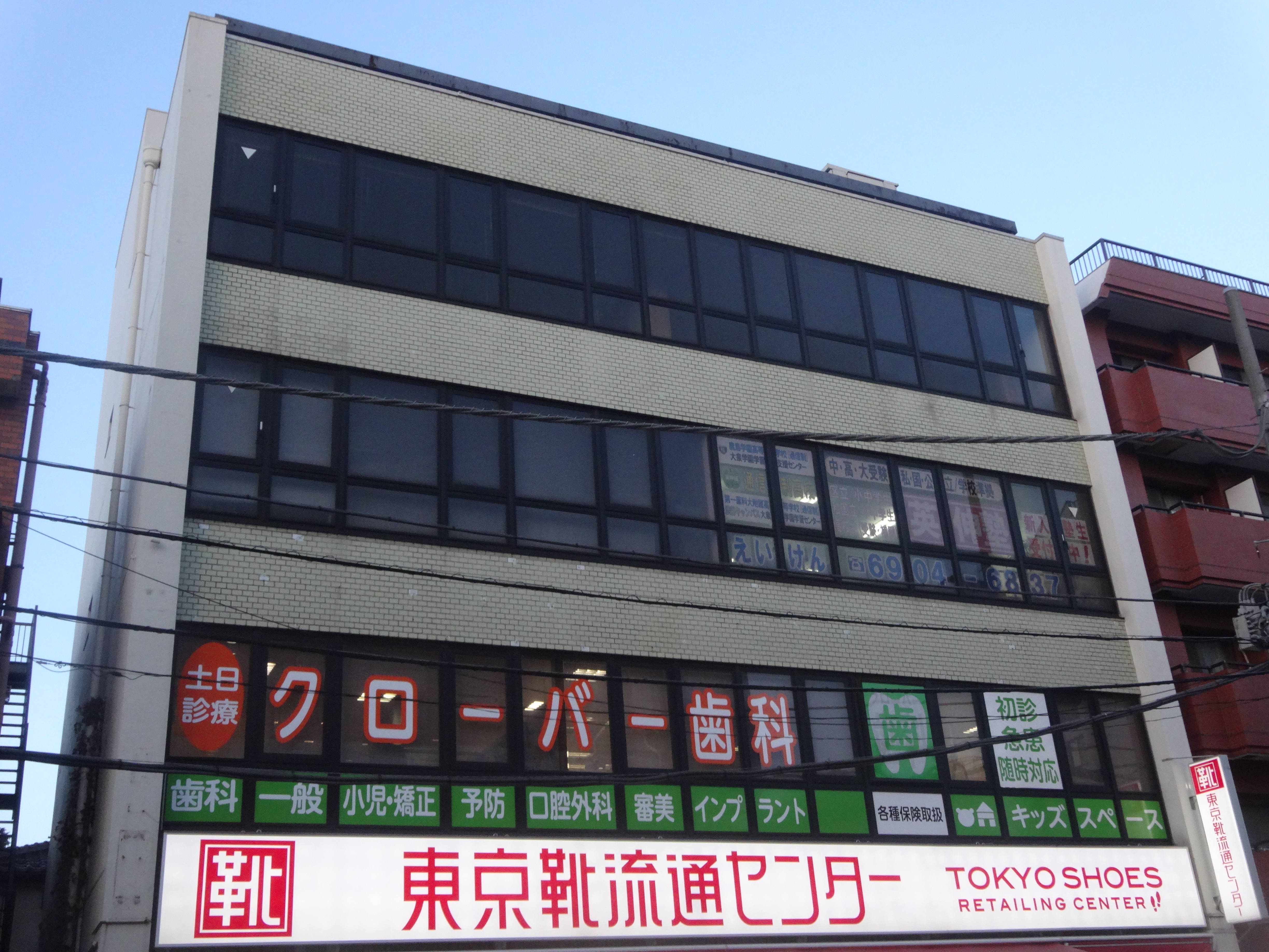 東京都練馬区東大泉に所在するビルであるビー・エムビル。東京靴流通センター大泉学園店（1F、かつてはゲームショップ・シータが入居していた）、クローバー歯科（2F）、学習塾・英伸塾（3F）、アニメ制作会社・G&G Directionなどが入居している。